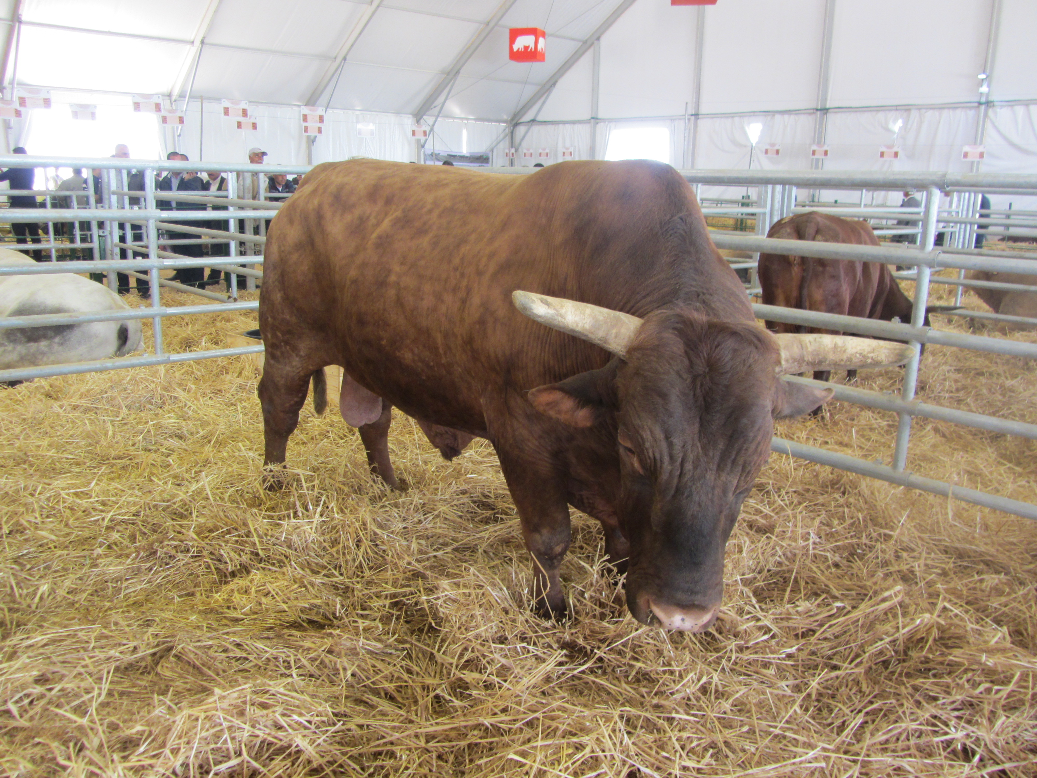 Reproducteur bovin présenté au Salon International de l'Agriculture au Maroc (avril 2014)